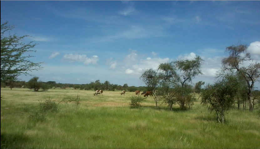 مراعي